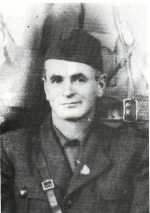 Методија Андонов-Ченто